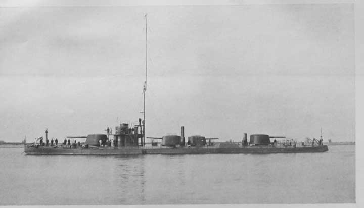 Лист книги Башенная канонерская лодка типа "Шквал"